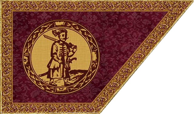 Військова хоругва Війська Запорозького. Приблизна реконструкція заснована на а) Малюнку з "Вірша на жалосний погреб гетьмана Петра Конашевича Сагайдачного", б)Зображенню прапора козацької корогви домонтівської сотні 1762 р. З «Історії України» Грушевського., в) Зразків козацького орнаменту г) Джерельних згадок про переважаючі малинові та червоні кольори козацької геральдики.